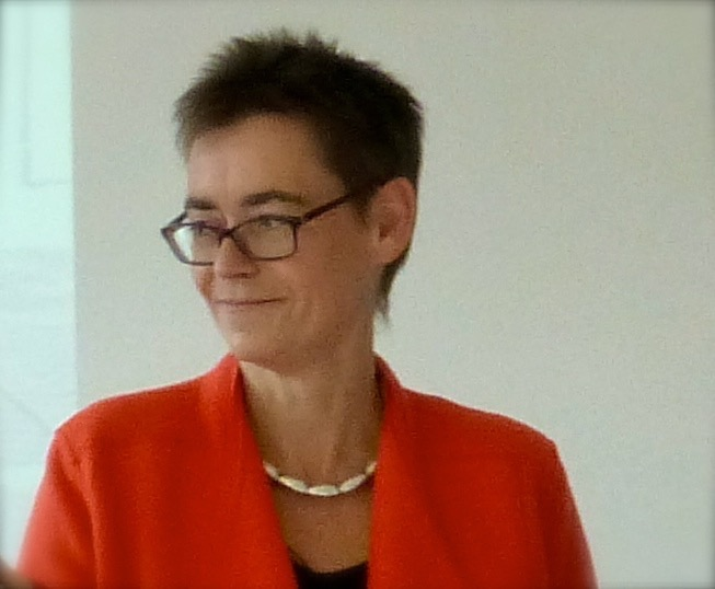 Margaret Heckel als Moderatorin am 10. 11. 2016 in Berlin